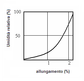 geändert